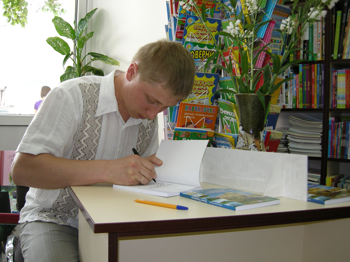 Презентація книги Володимира Мороза «Замки Тернопілля» у книгарні «Ярослав Мудрий» на вул. Руській (м. Тернопіль).